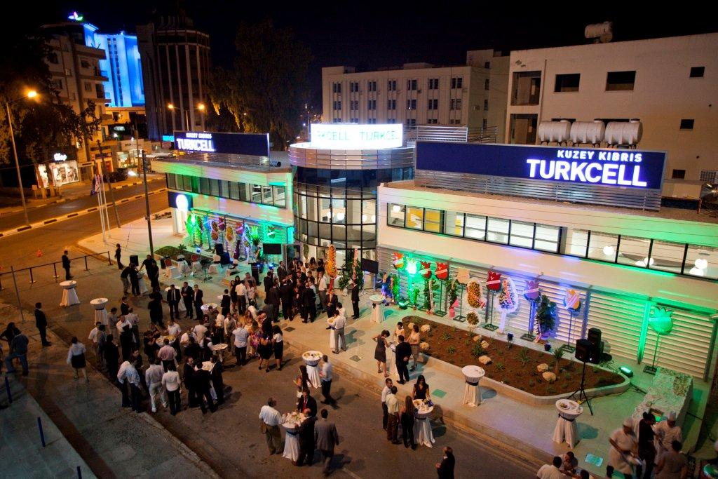 KKTCELL MERKEZ OFİS